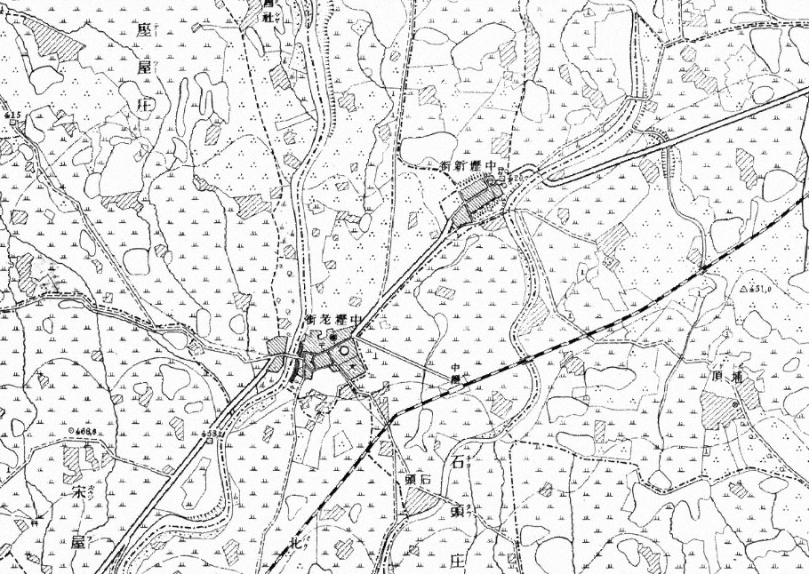 中文（台灣）: 臺灣堡圖－中壢車站周圍截圖。本圖1904年出版，已超過版權保護期。